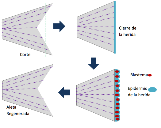 Regeneración en la aleta del pez cebra. Las lineas punteadas indican el punto de corte, luego la formación de la epidermis de la herida, la formación del blastema y luego la aleta regenerada en su totalidad.